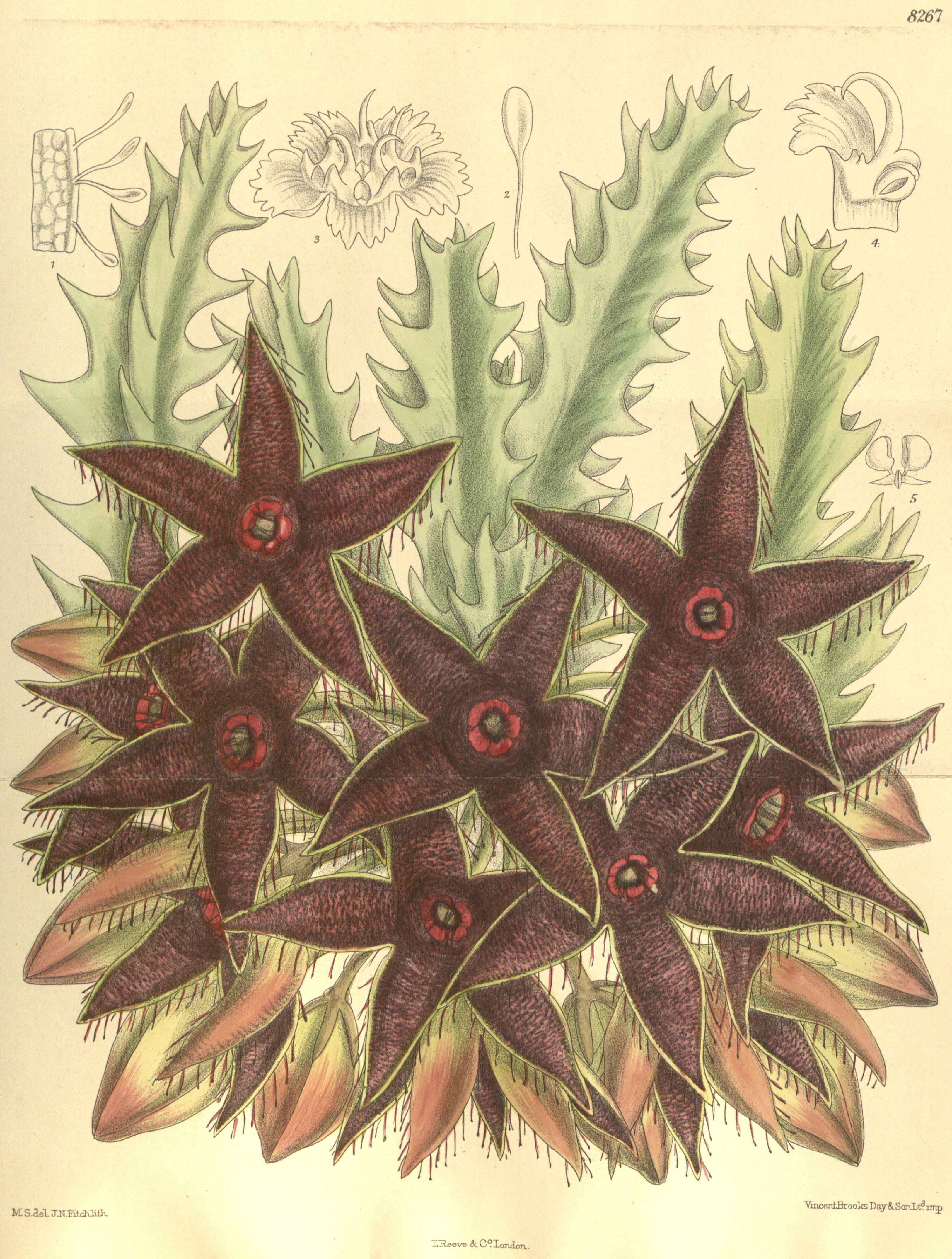 Caralluma nebrownii (= Orbea lutea subsp. vaga), Apocynaceae, Asclepiadoideae